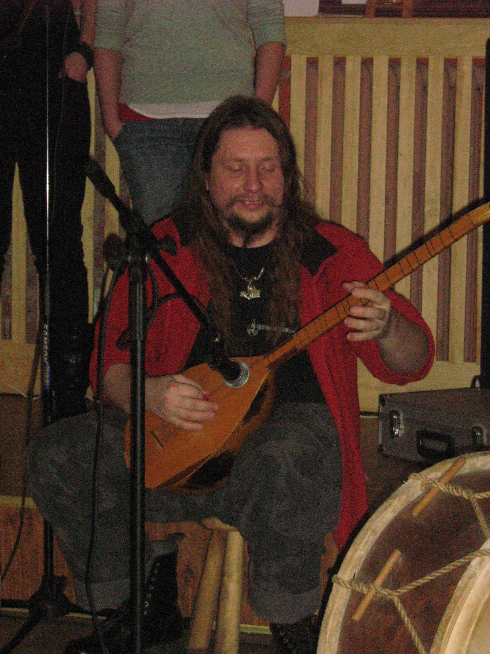 Mikołaj Rybacki z grupy Percival Schuttenbach